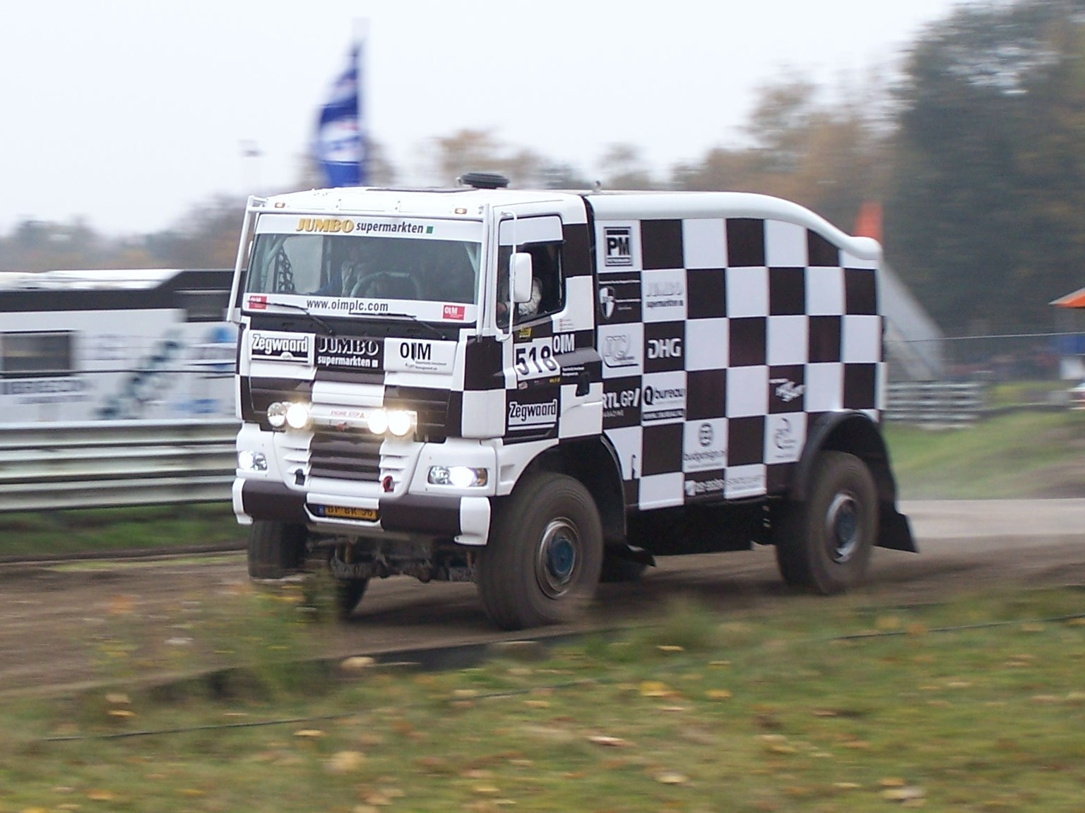 Jan Lammers (autocoureur)